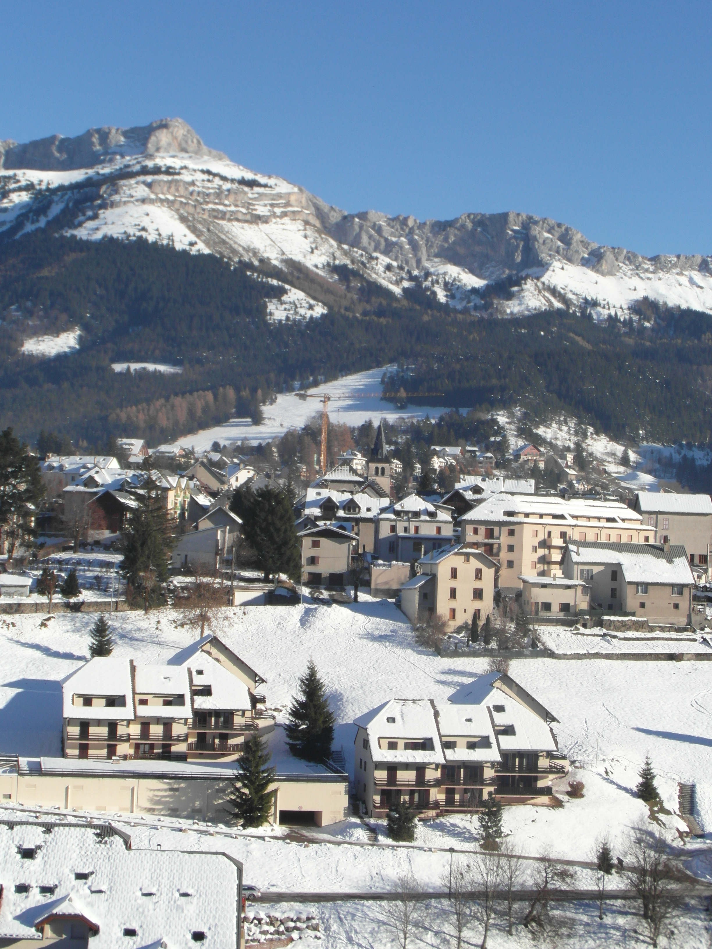 Villard en décembre 2013